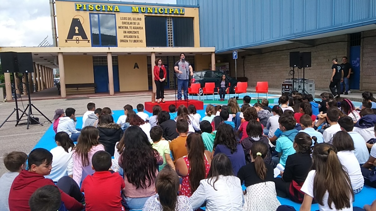 Inauguración do poema visual de David Fernández Rivera no Porriño.